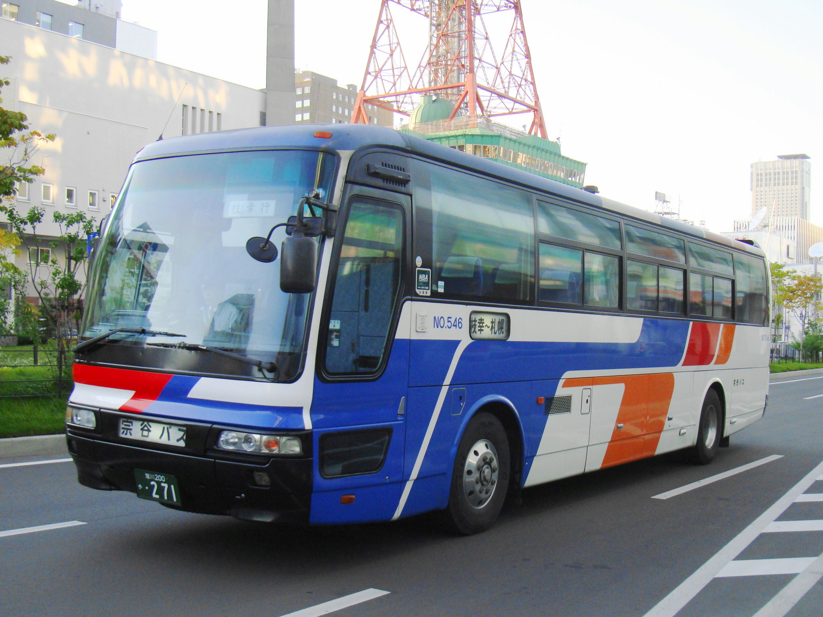 "Tokkyū Esashi gō" Saporo to Esashi(Sōya)